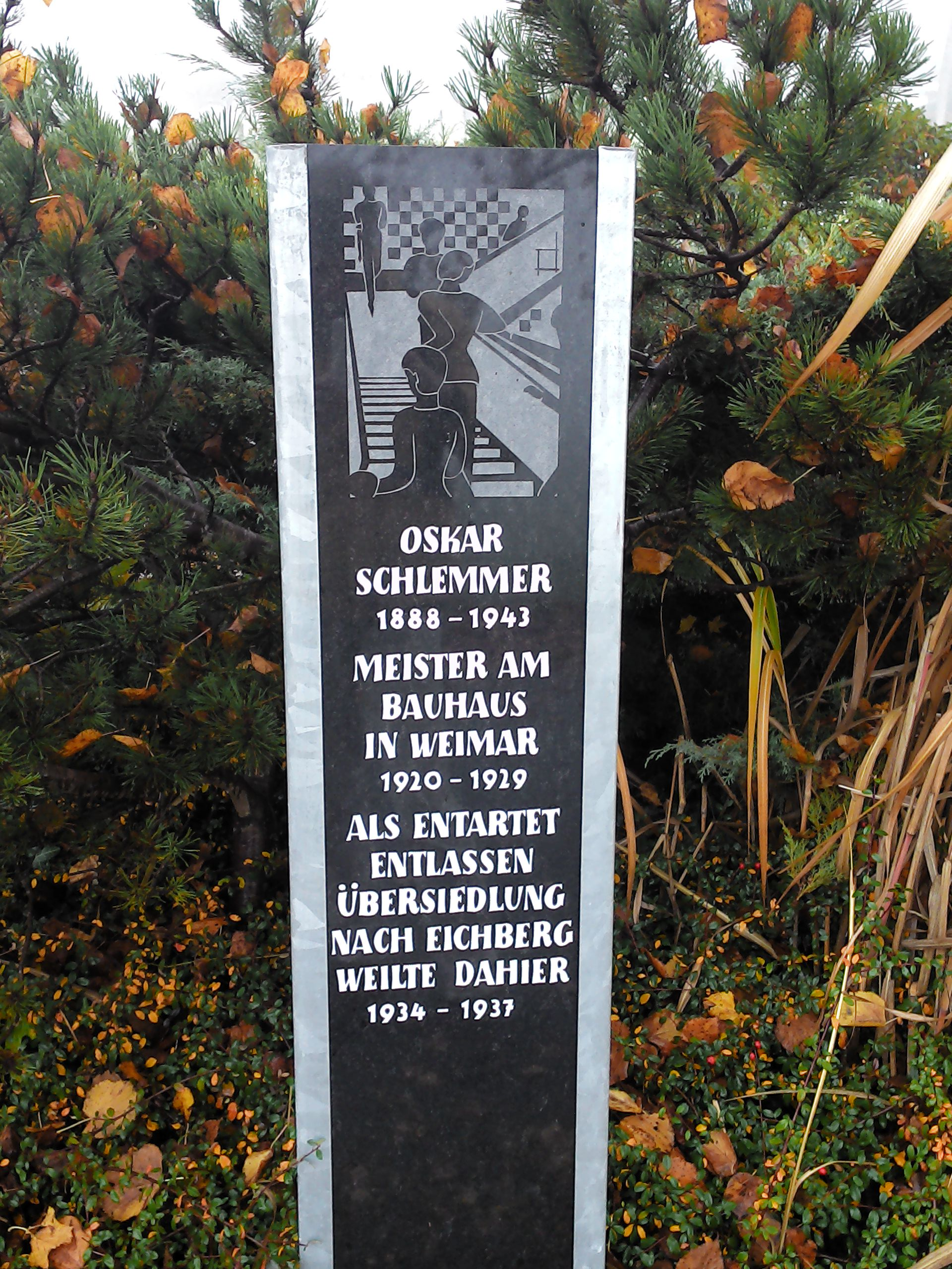 Stele zum Exil Oskar Schlemmers 1934 bis 1937 in Eichberg bei Dettighofen.